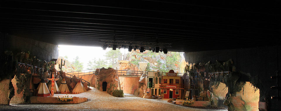 Ein Bild der neu gestalteten Bühne in Winzendorf von 2012